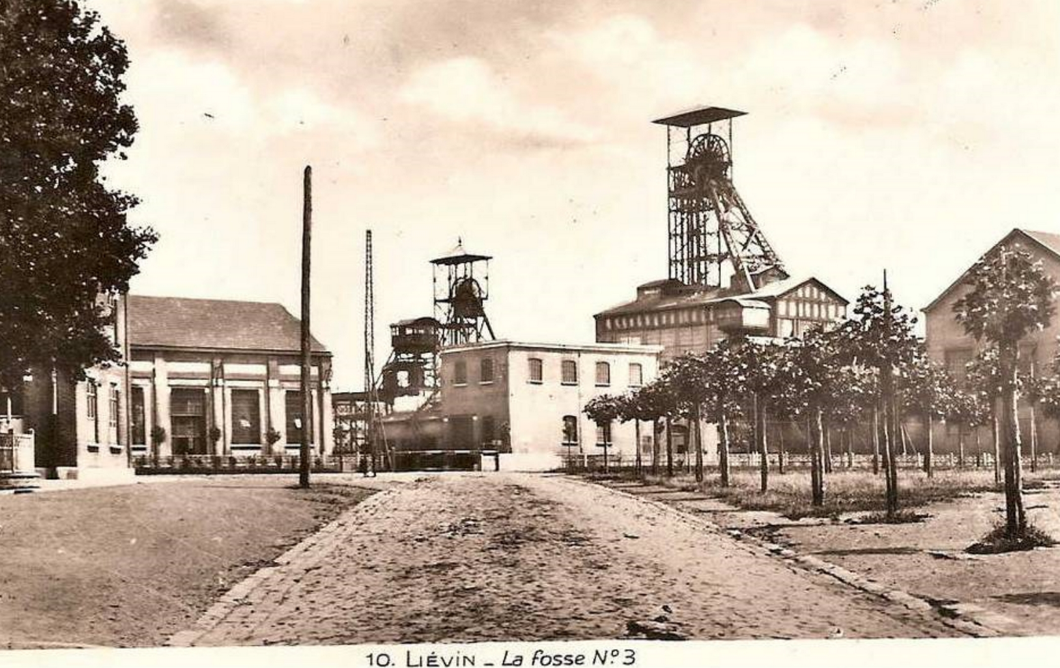 Fosse n° 3 - 3 bis - 3 ter de la Compagnie des mines de Liévin, Éleu-dit-Leauwette, Pas-de-Calais, Nord-Pas-de-Calais, France.